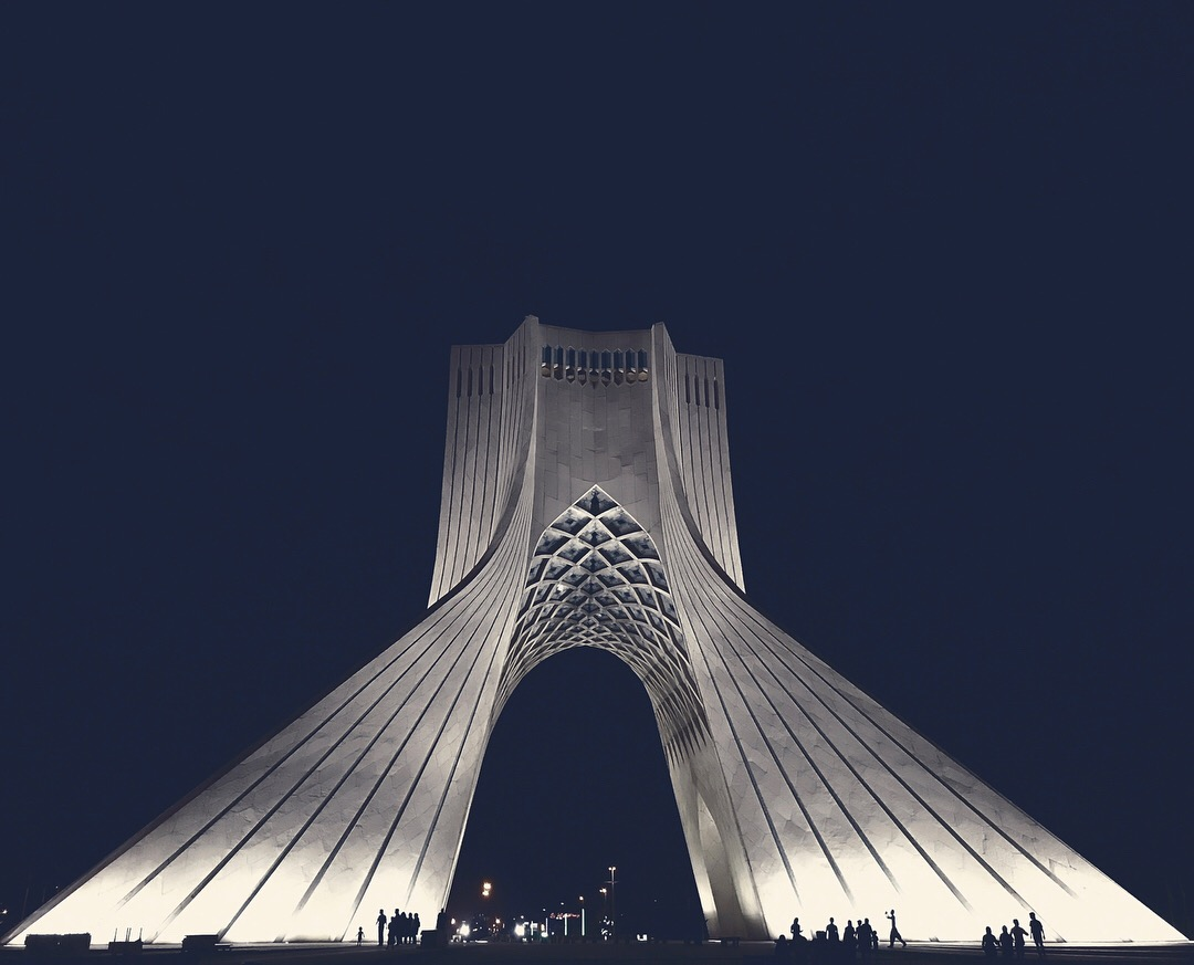 برج آزادی